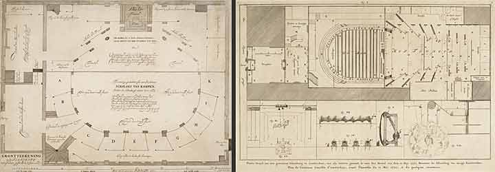 Schouwburg van Van Campen. Plattegrond tonende het voorportaal, de ingang, de bak en het toneel zoals het in 1637 gebouwd is/plattegrond tonende de ingang, het voorportaal, de bak en het toneel zoals het voor de brand van 1772 was.